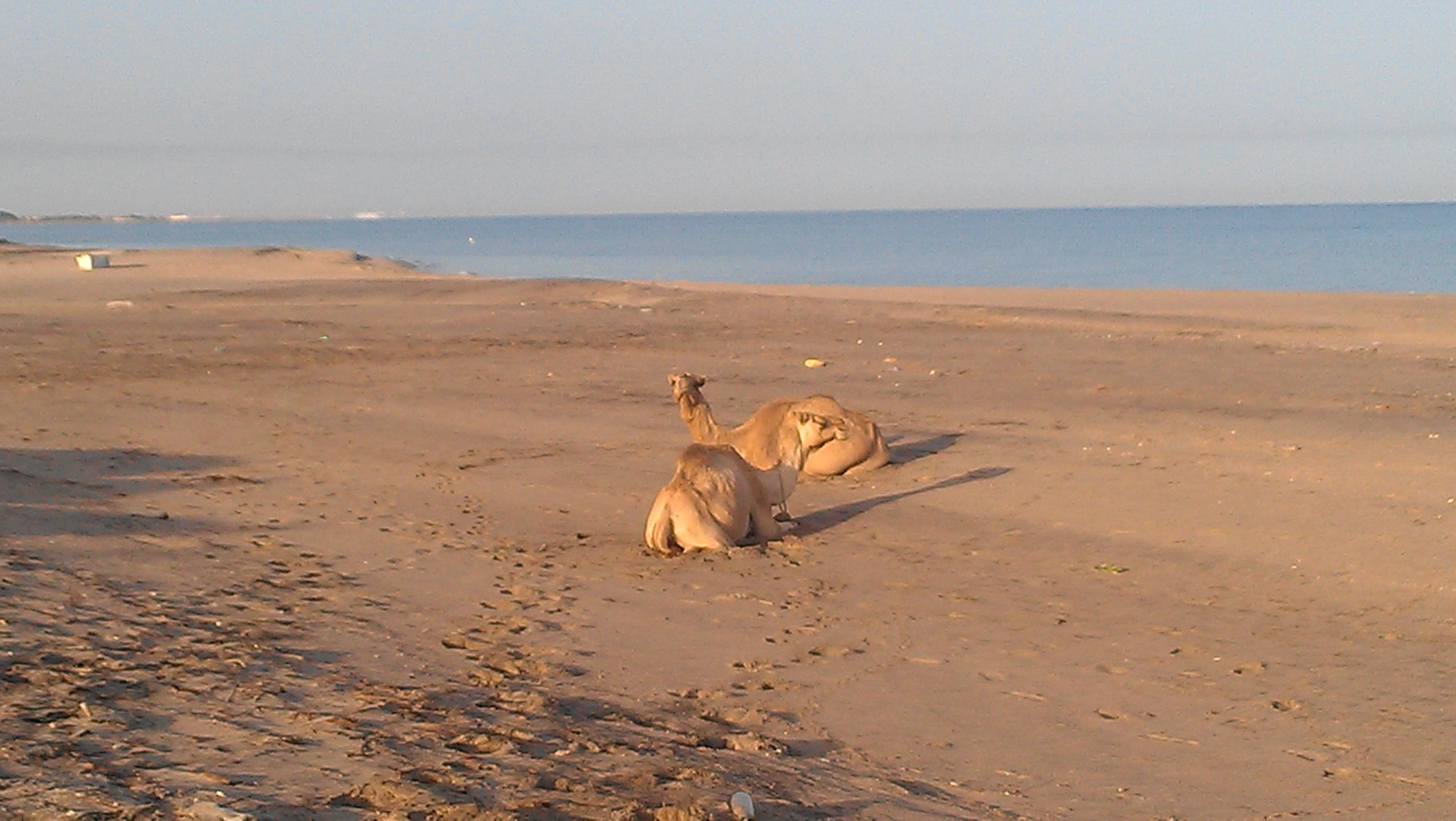 Berbera, Somaliland